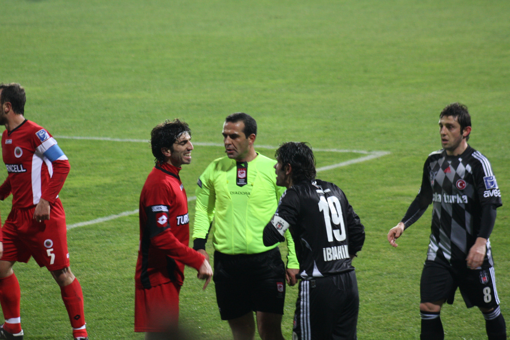 Bünyamin gezer Beşiktaş vs Gençlerbirliği Mücadesi yönetiminde 2010